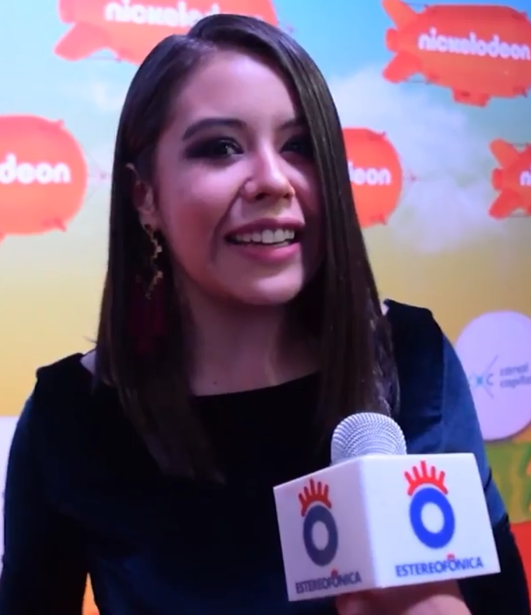 Juliana Velázquez en la alfombra naranja de los Kids' Choice Awards Colombia 2016